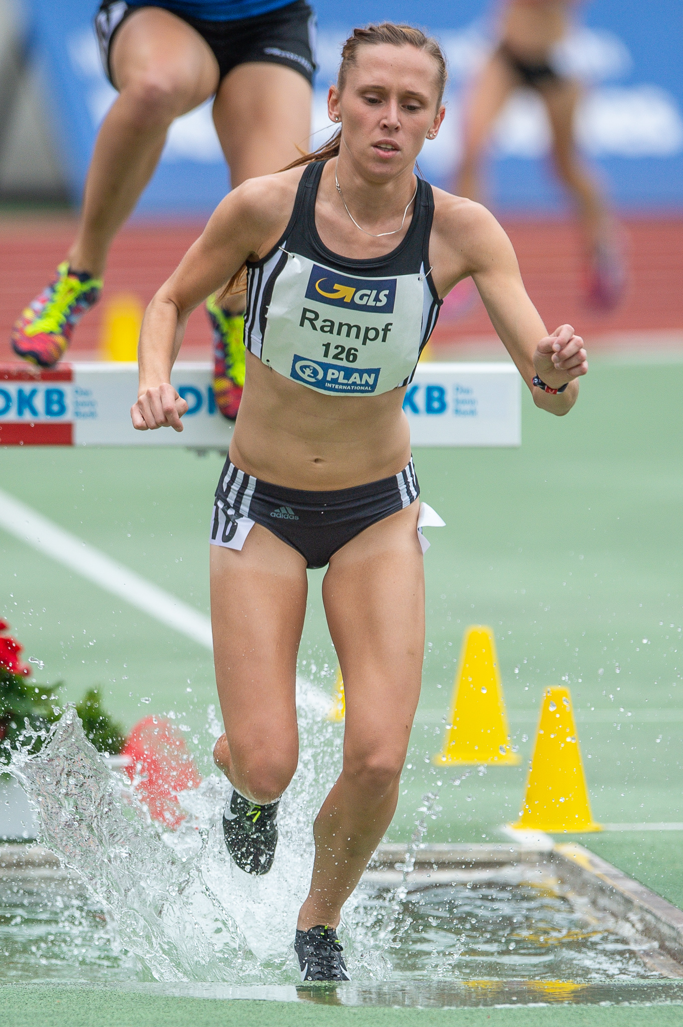 3000 Meter Hindernislauf,Colett Rampf,DLV,Deutsche Leichtathletik Meisterschaften 2018,Deutscher Leichtathletik-Verband,Max-Morlock-Stadion,Steeplechase,VfL Rathenow